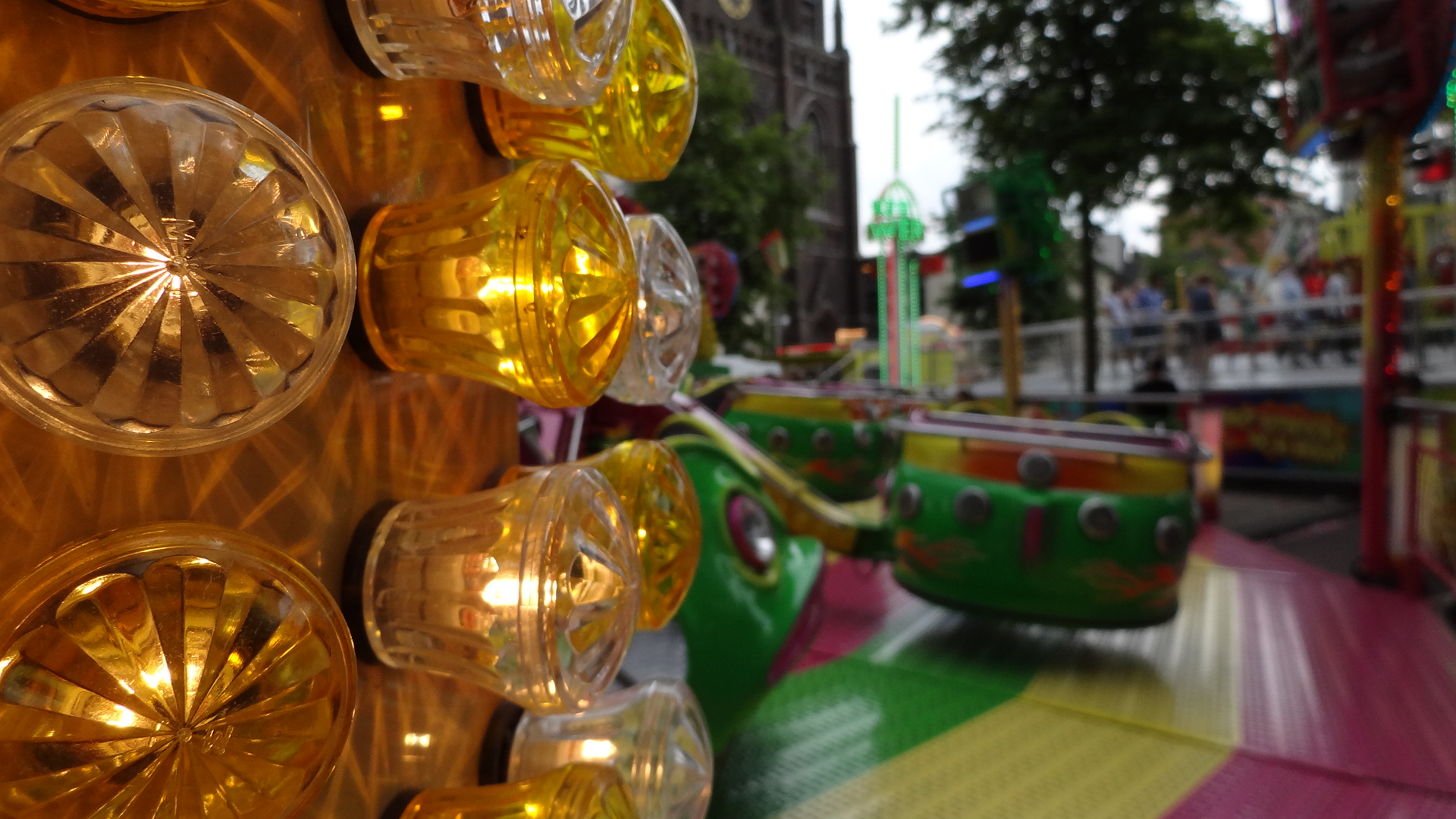 Kermis Attractie de octopus op de Heuvel in Tilburg